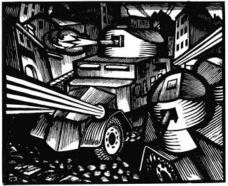 Броневики. 1918. Гравюра на дереве. Государственная Третьяковская галерея